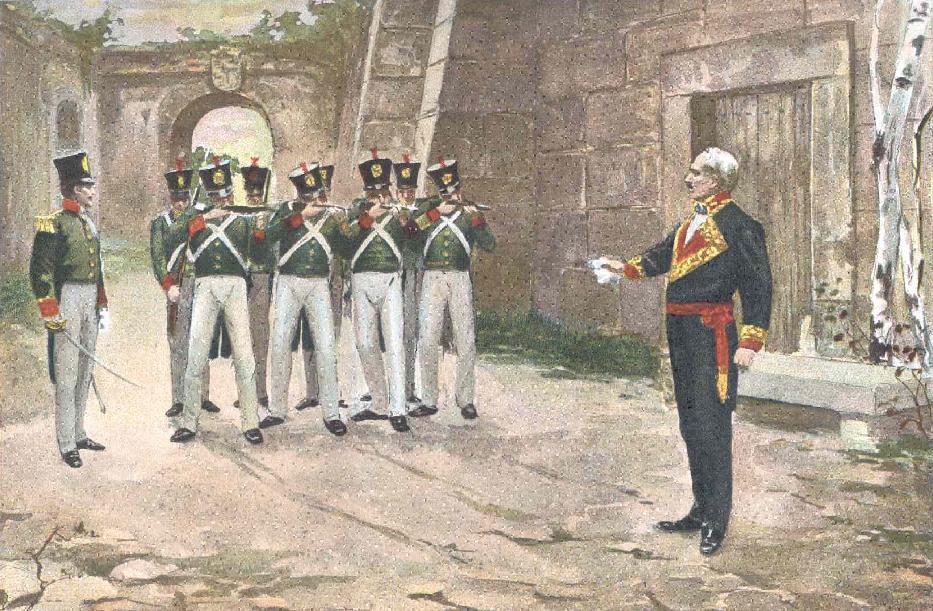 Fusilamiento del teniente general Luis Lacy y Gautier. Fue fusilado el día 5 de julio de 1817 en los fosos del Castillo de Bellver. El dibujo no reproduce fielmente la ejecución del general Lacy, ya que el general recibió la descarga sentado en una silla, por padecer en esos momentos un ataque de gota.